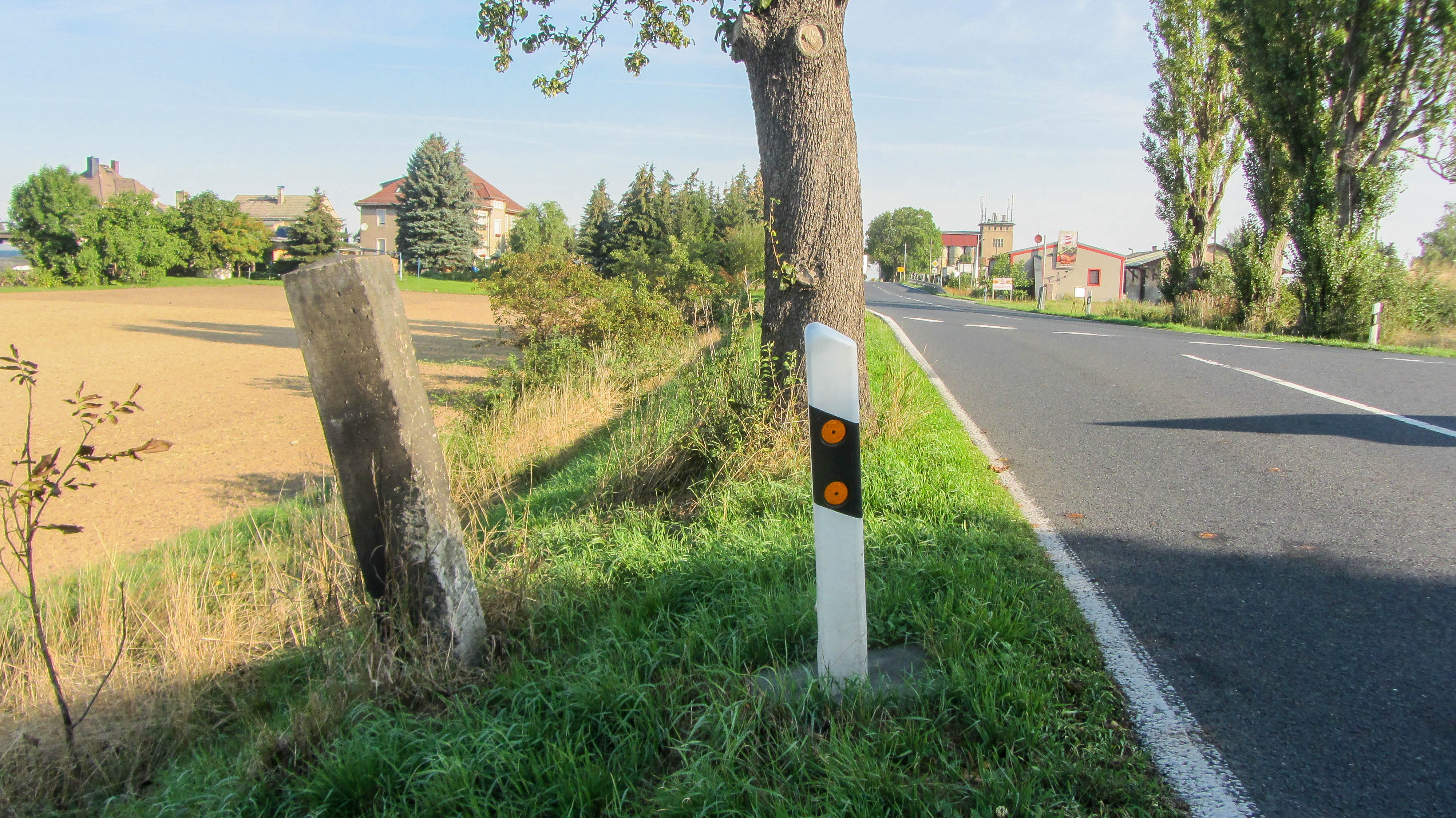 Wegweiserstein an der S 85, Lommatzscher Straße in Hirschstein OT Mehltheuer Text: Seerhausen ; Zehren ; Riesa ; Lommatzsch ; Richtungsweiser